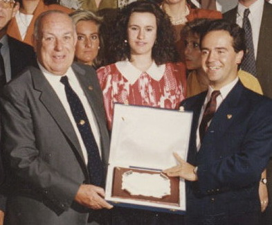 Homenaje a José Antonio Muñoz García